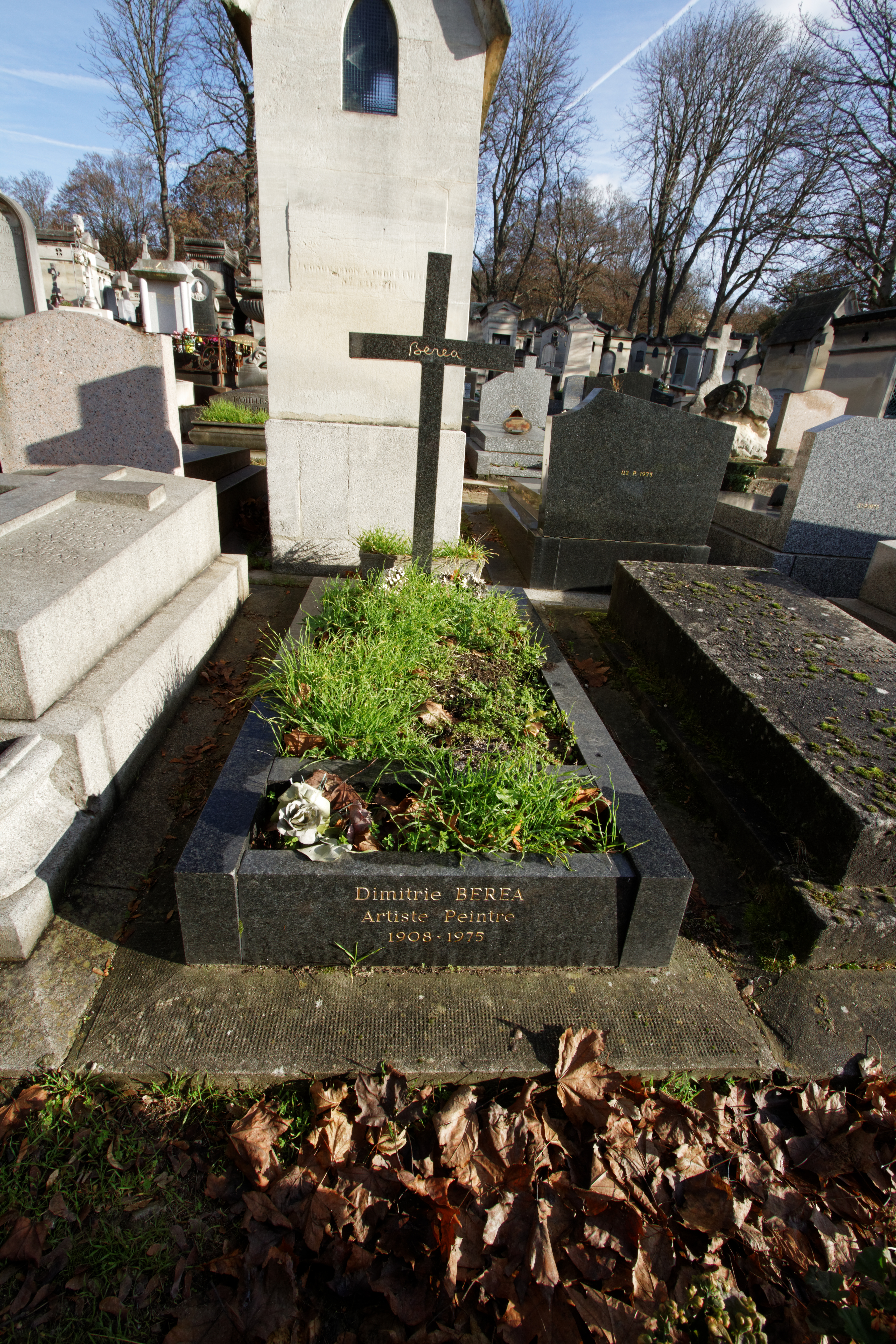 Sépulture de Dimitri Berea (1908-1975), peintre roumain.